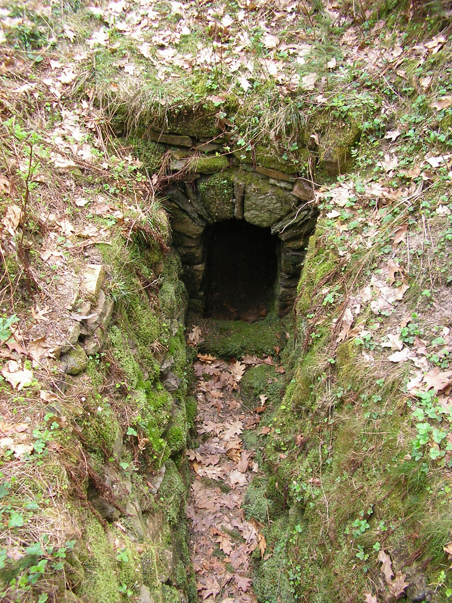 Tiefer Martin Römer Erbstolln, Landkreis Schneeberg, Erzgebirge, Sachsen, Deutschland